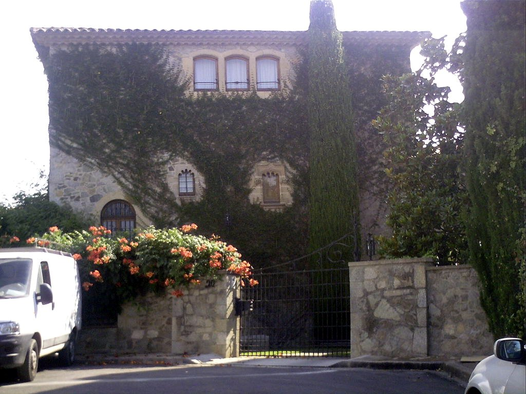 Masia de Ca n'Amat, segle XIV, a Catalunya, Cabrils, comarca del Maresme. Amb finestres gòtiques.